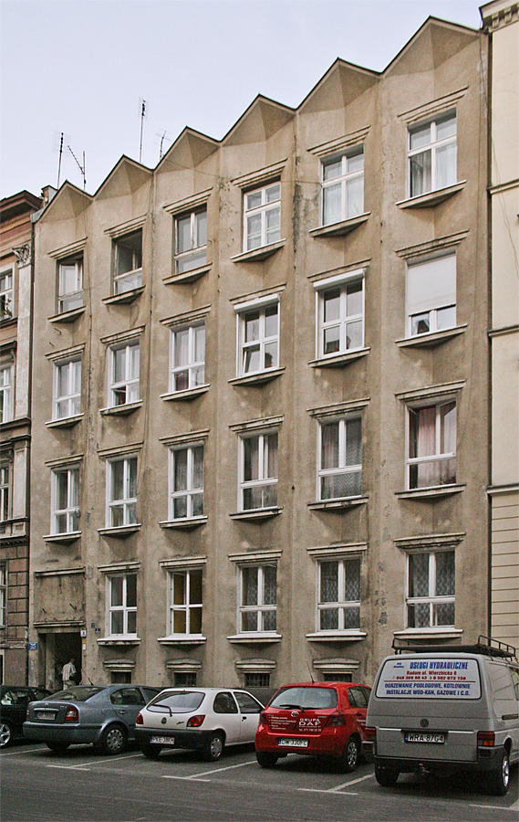 Kamienica przy ul. Bałuckiego 2 we Wrocławiu